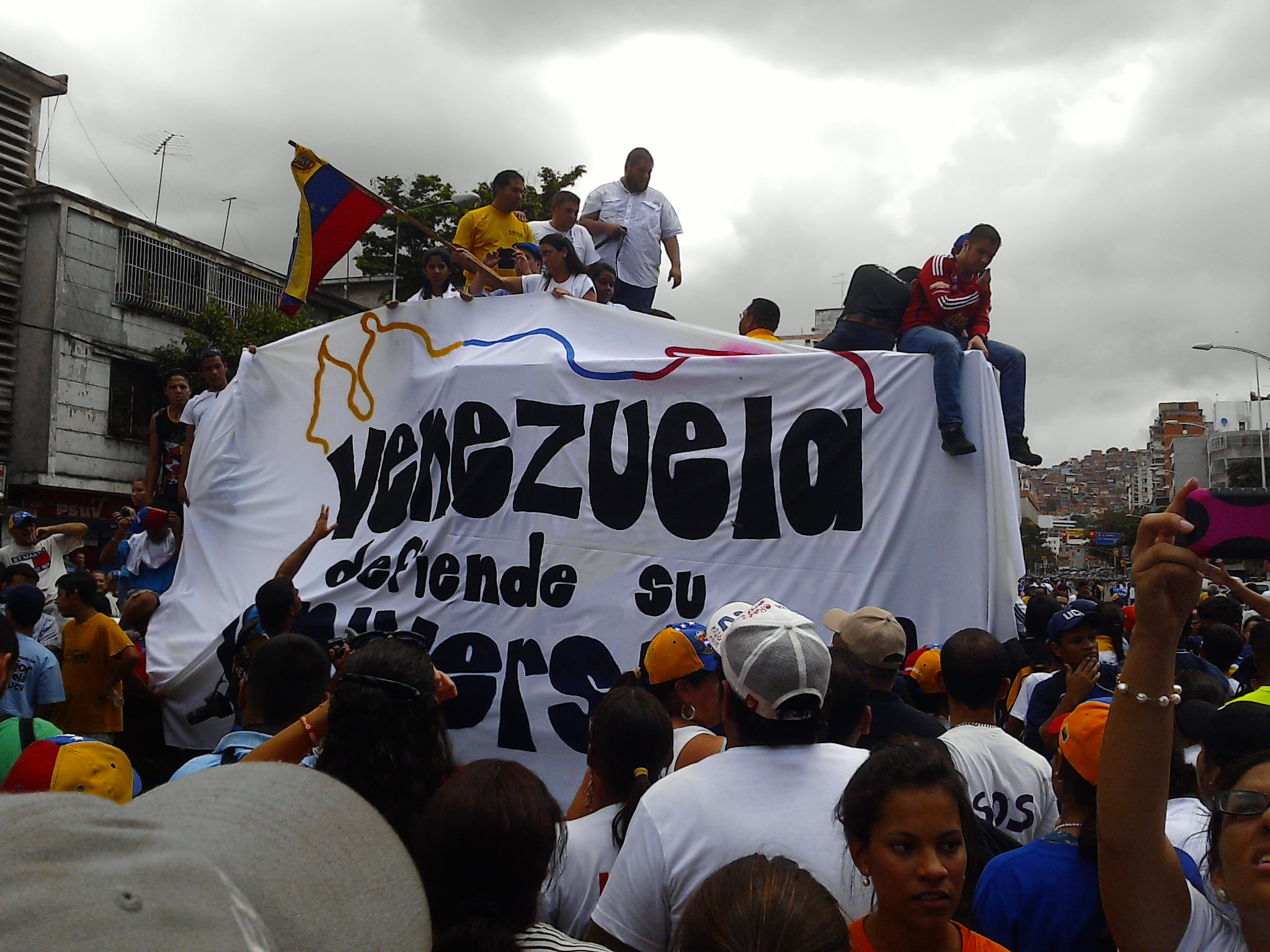 Marcha universitaria en Caracas, Venezuela. 2014.